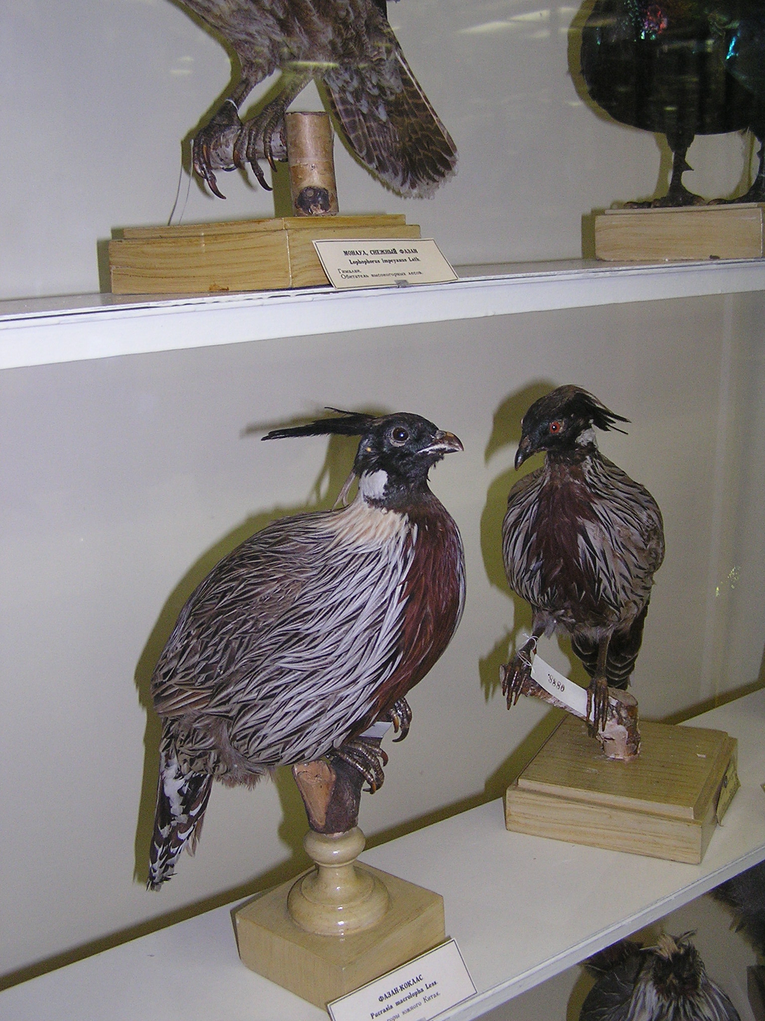 Зоологический музей в Санкт-Петербурге. Фазан-коклас